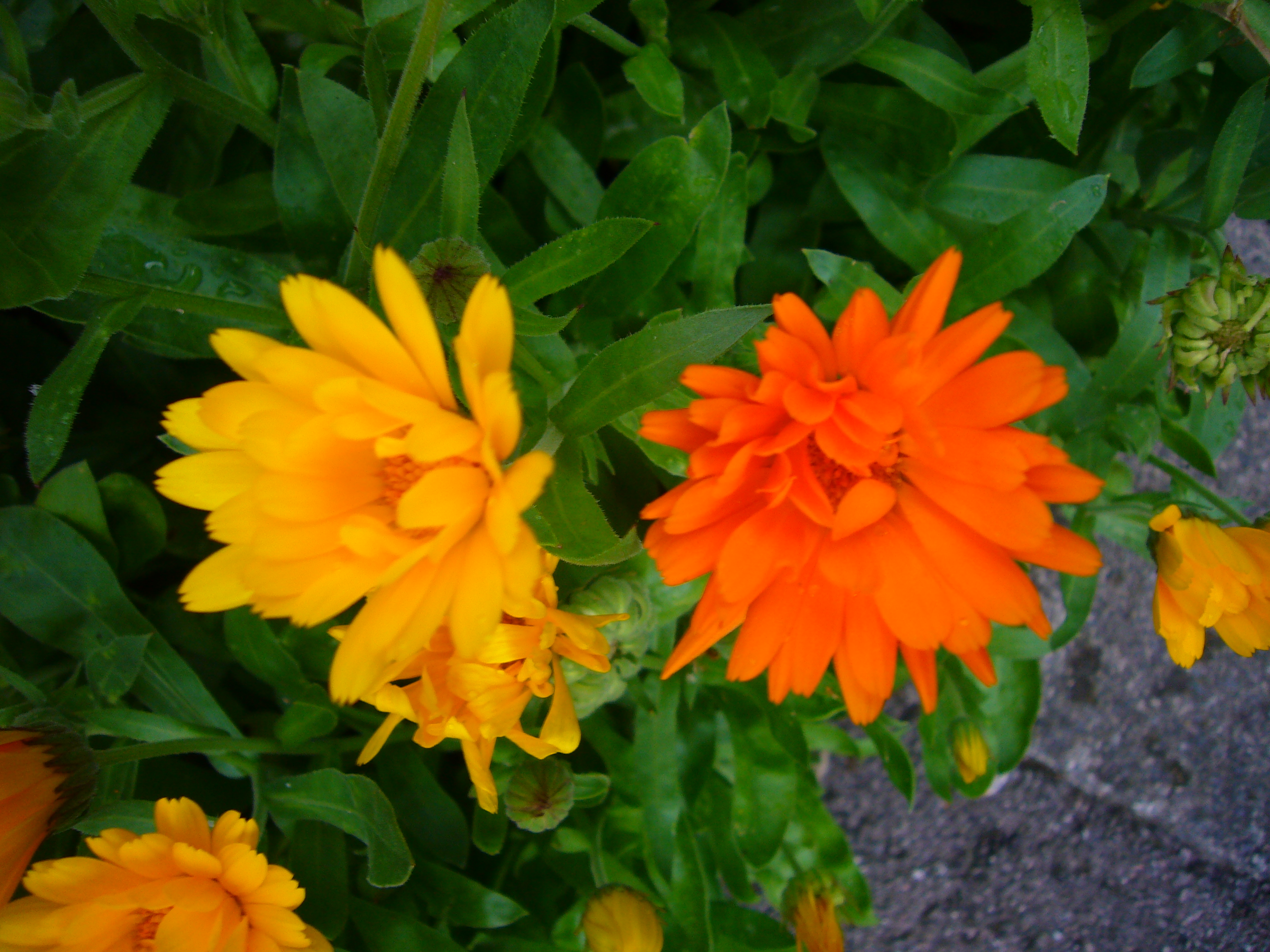 Calendula officinalis